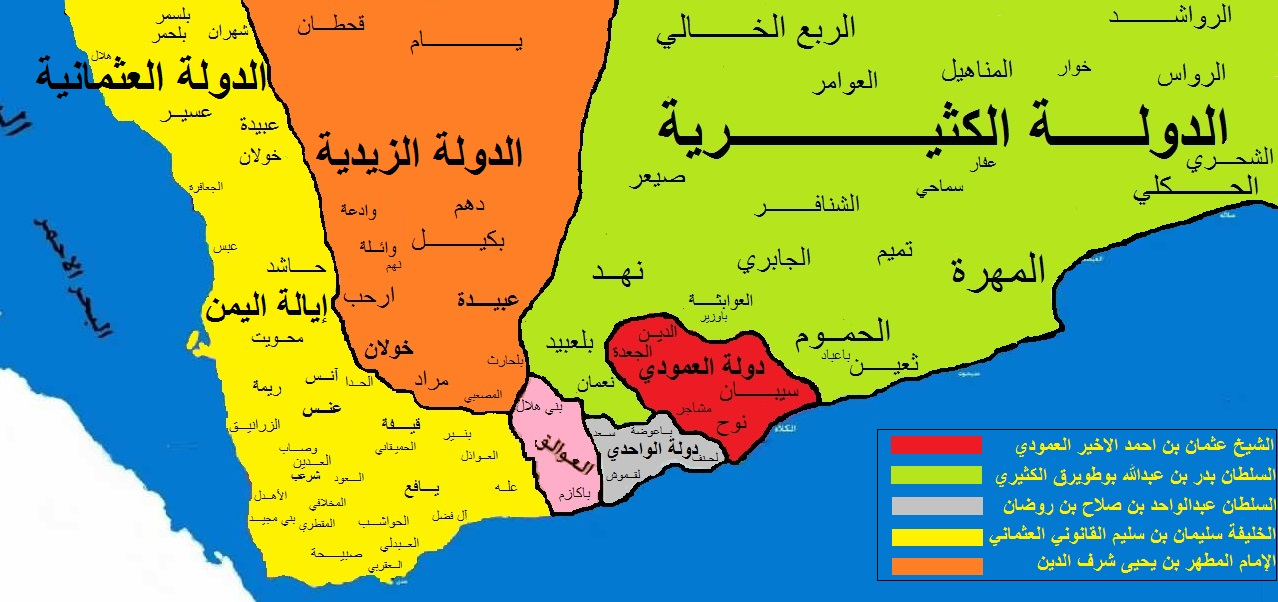 خريطة جنوب الجزيرة العربية حضرموت واليمن فترة السلطان بدر بوطويرق أواخر القرن السادس عشر ميلادي